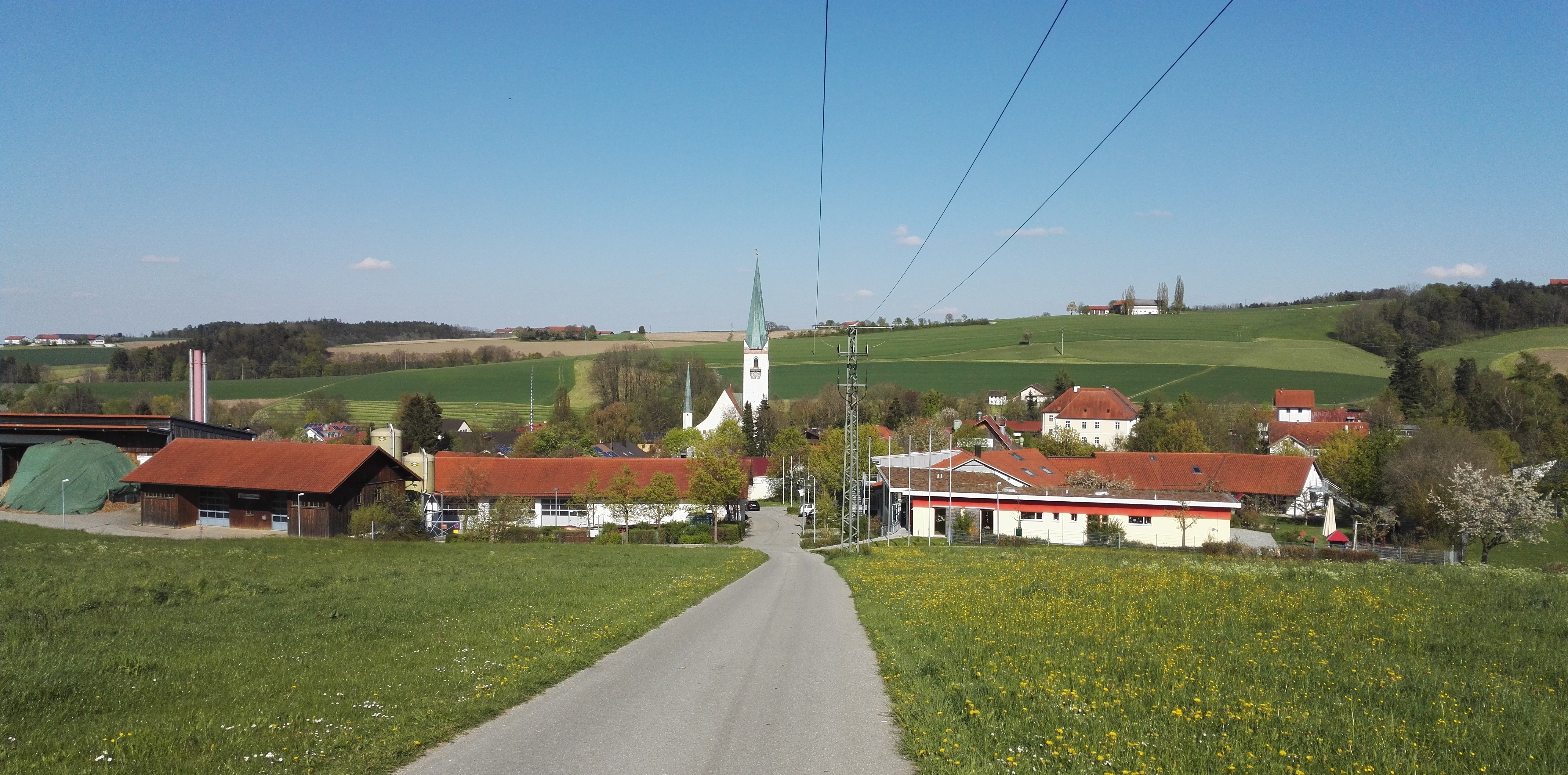 St. Wolfgang im Landkreis Erding